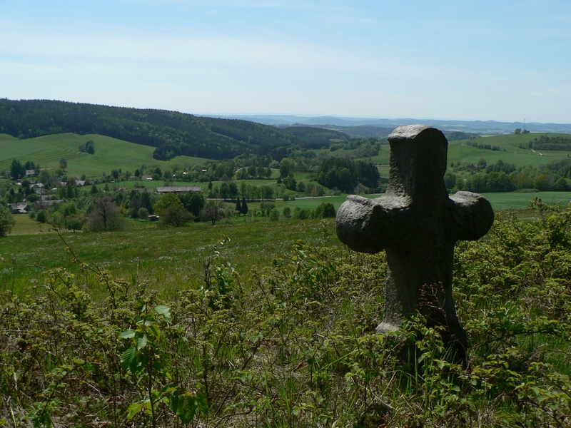 Kříž nad Mladkovem.